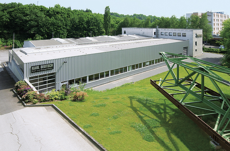 Werk 2 von KARL DEUTSCH am Otto-Hausmann-Ring 201.